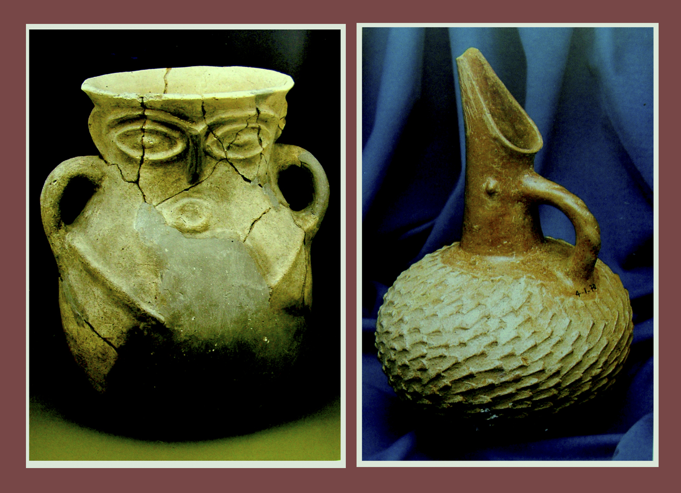 Kora bronzkori kerámiák (Anatóliai Civilizációk Múzeuma, Ankara, Törökország)